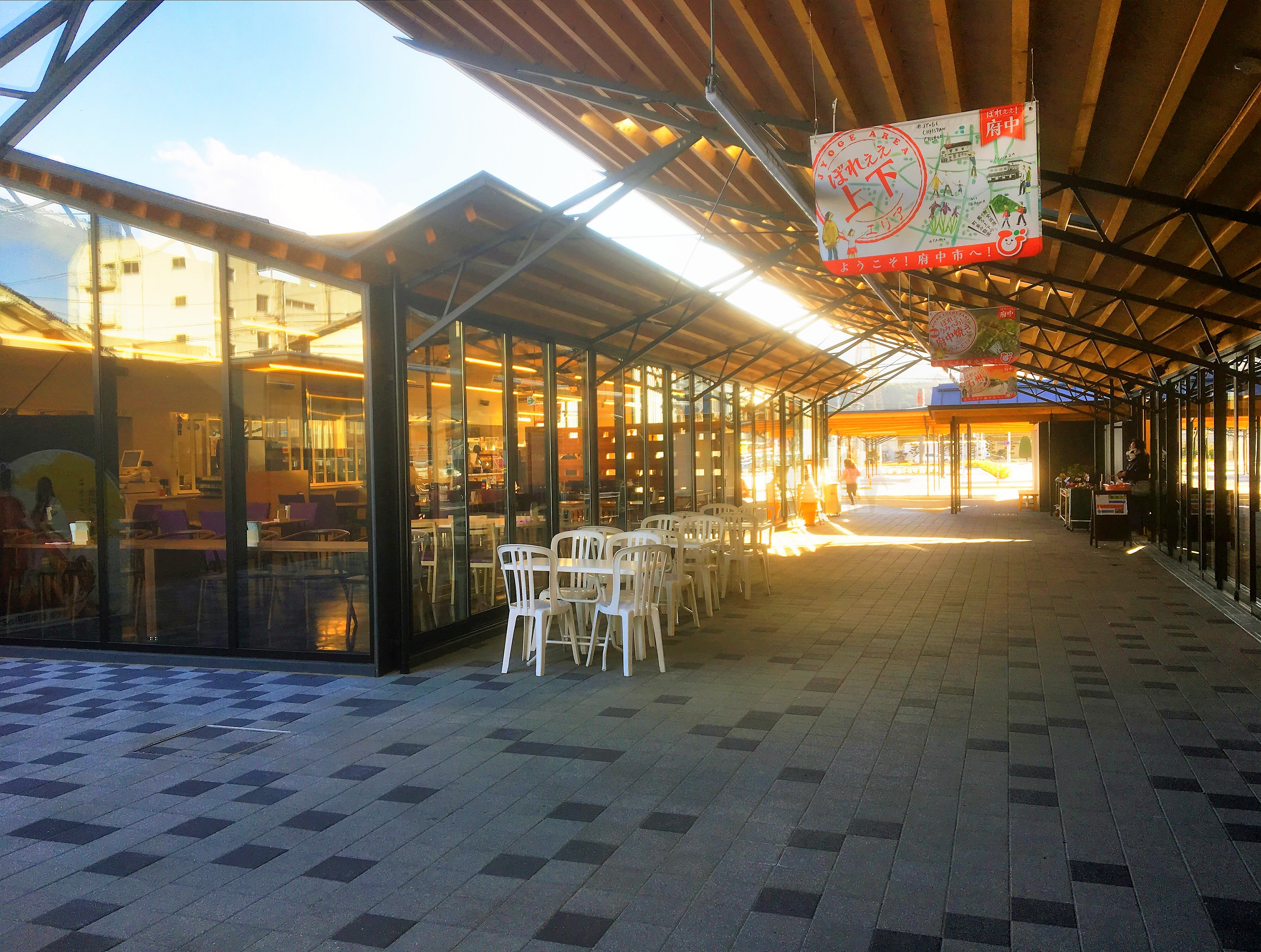 広島県府中市の「道の駅びんご府中」 平成28年10月22日（土）グランドオープン